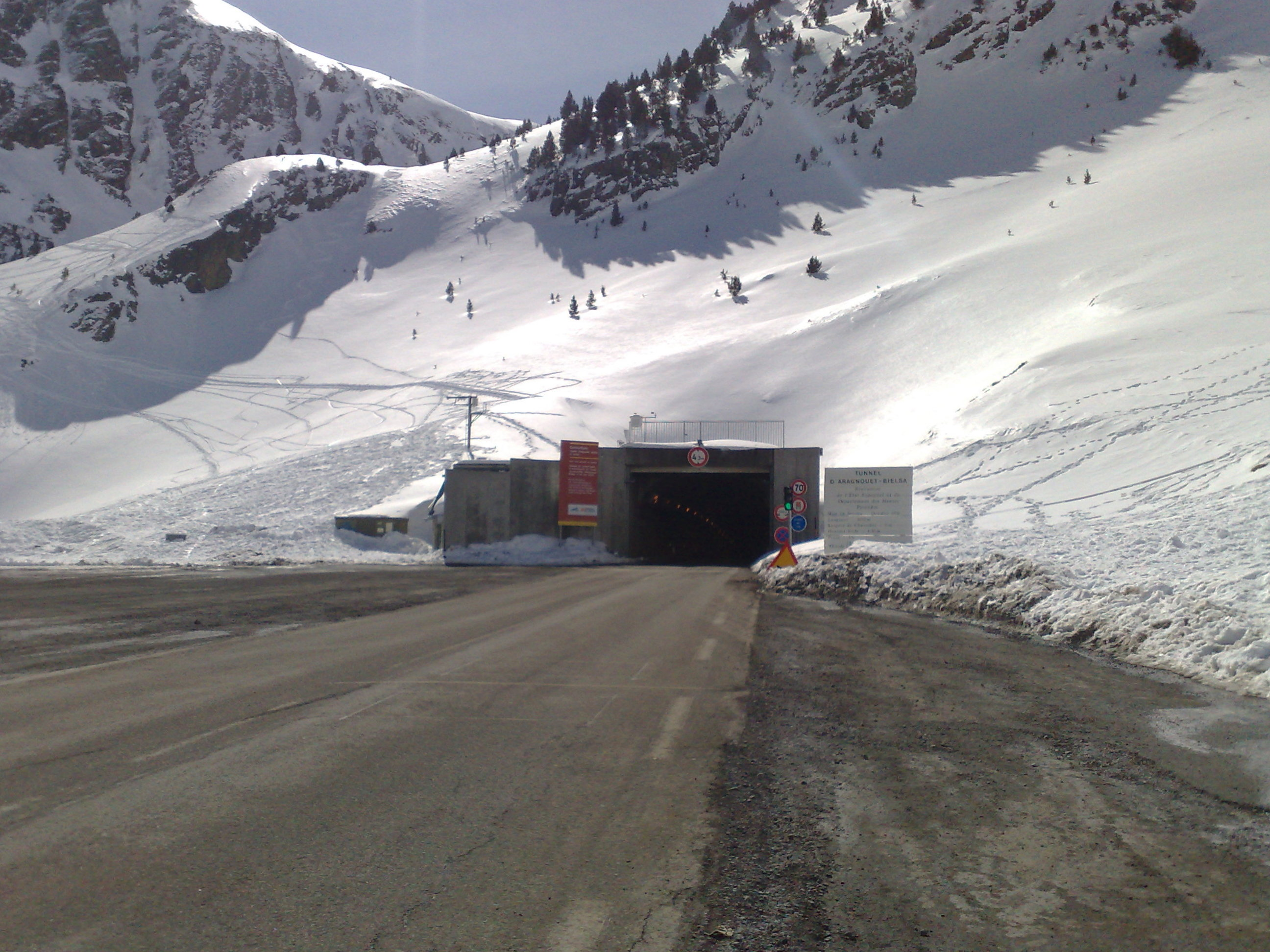 Entrée, côté France, du tunnel Aragnouet-Bielsa, Fr-65-Saint-Lary-Soulan.